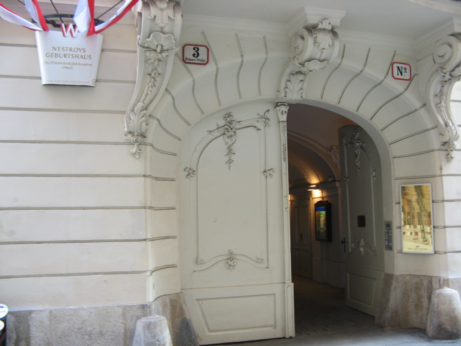 Portal, Bräunerstraße 3, Wien-Innere Stadt